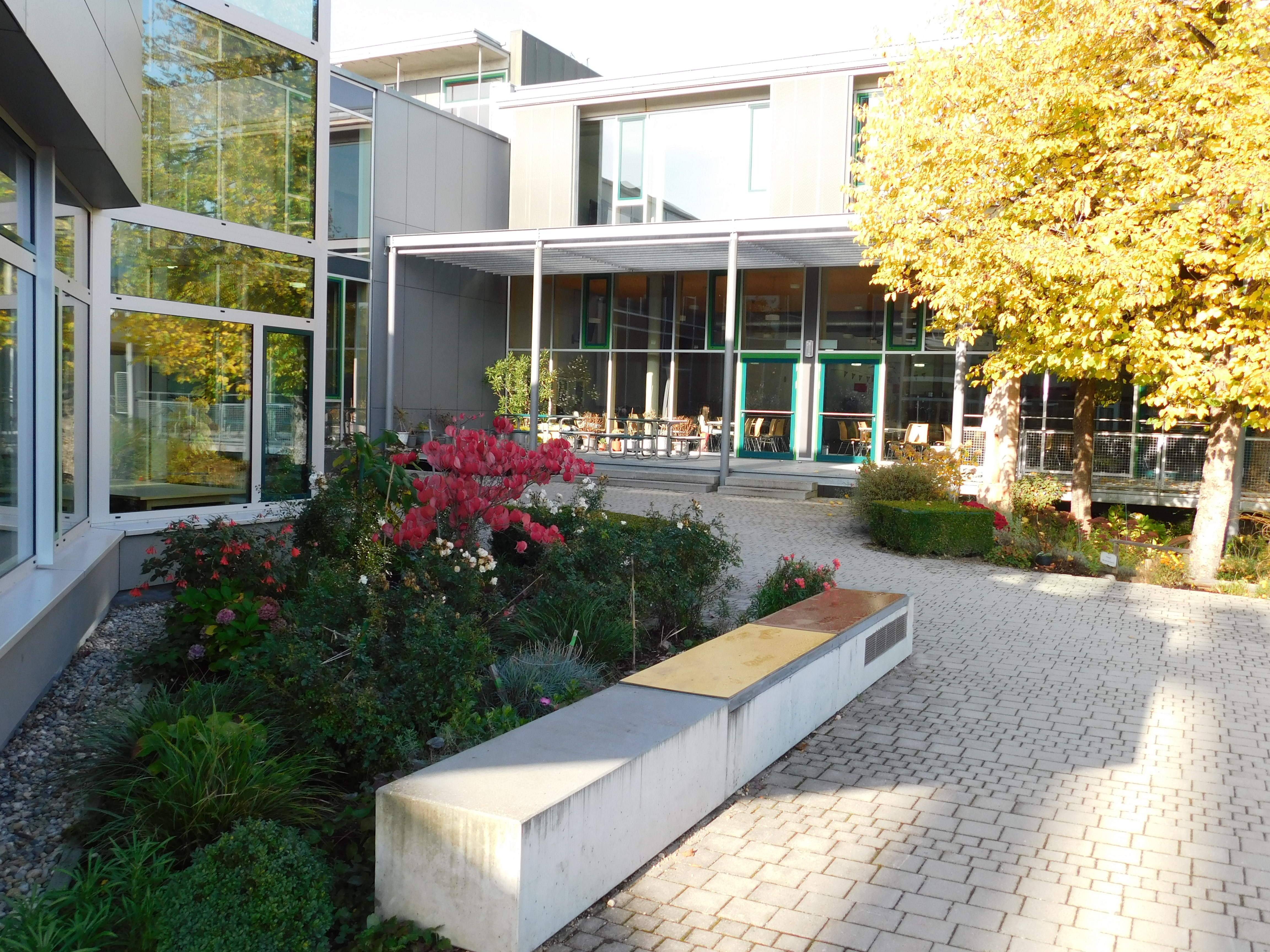 Christoph-Probst-Gymnasium Gilching Bayern Deutschland Mensa.